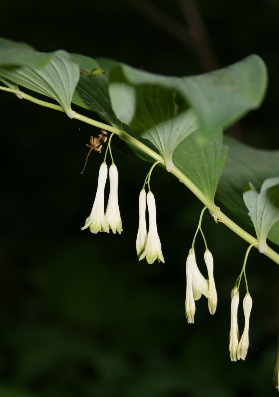 Vielblütige Weißwurz (Polygonatum multiflorum), Mäusedorngewächse (Ruscaceae) - Österreich/Austria/Autriche: Wien, Schönbrunn